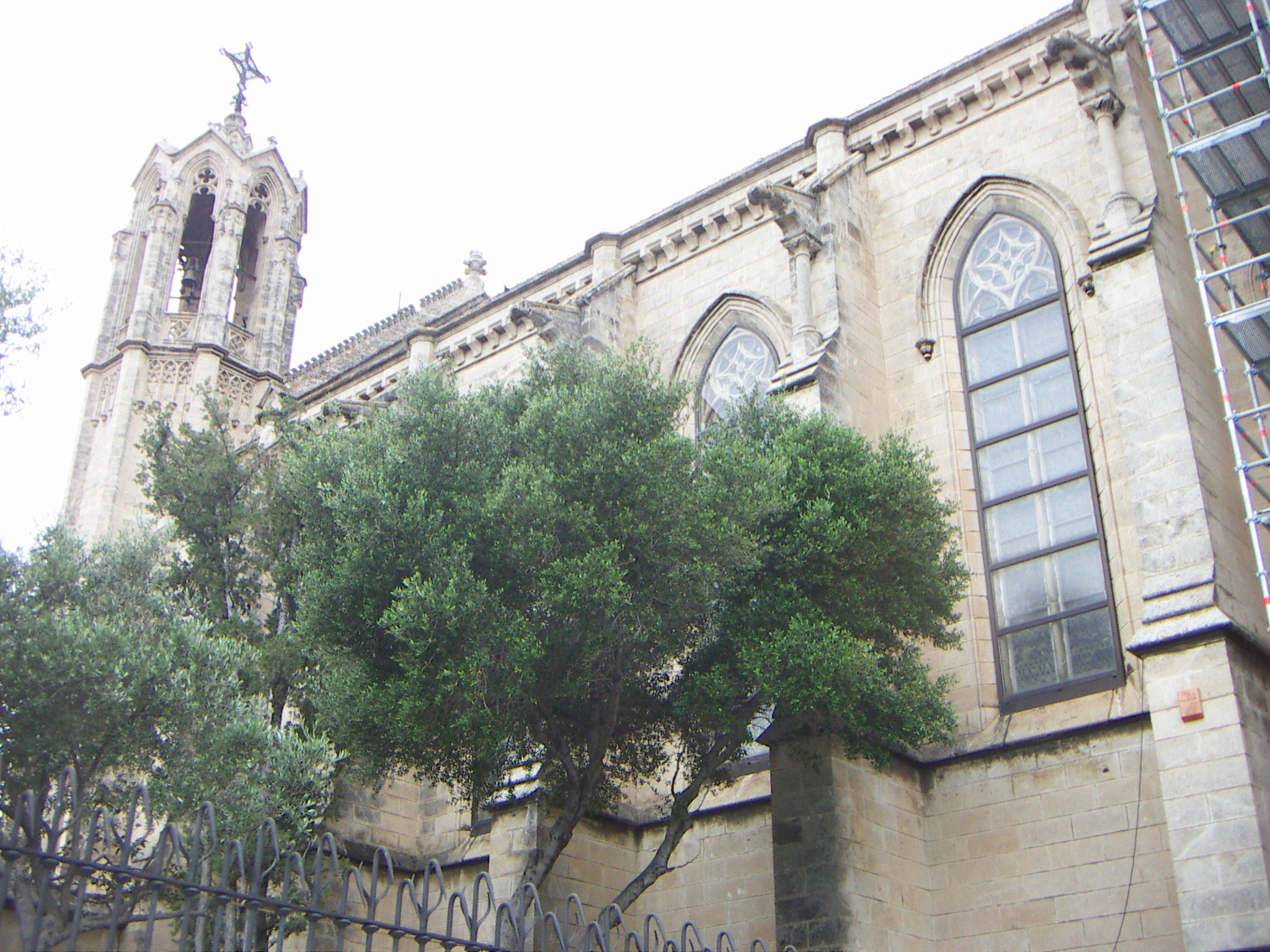 Església de Santa Maria de Portbou